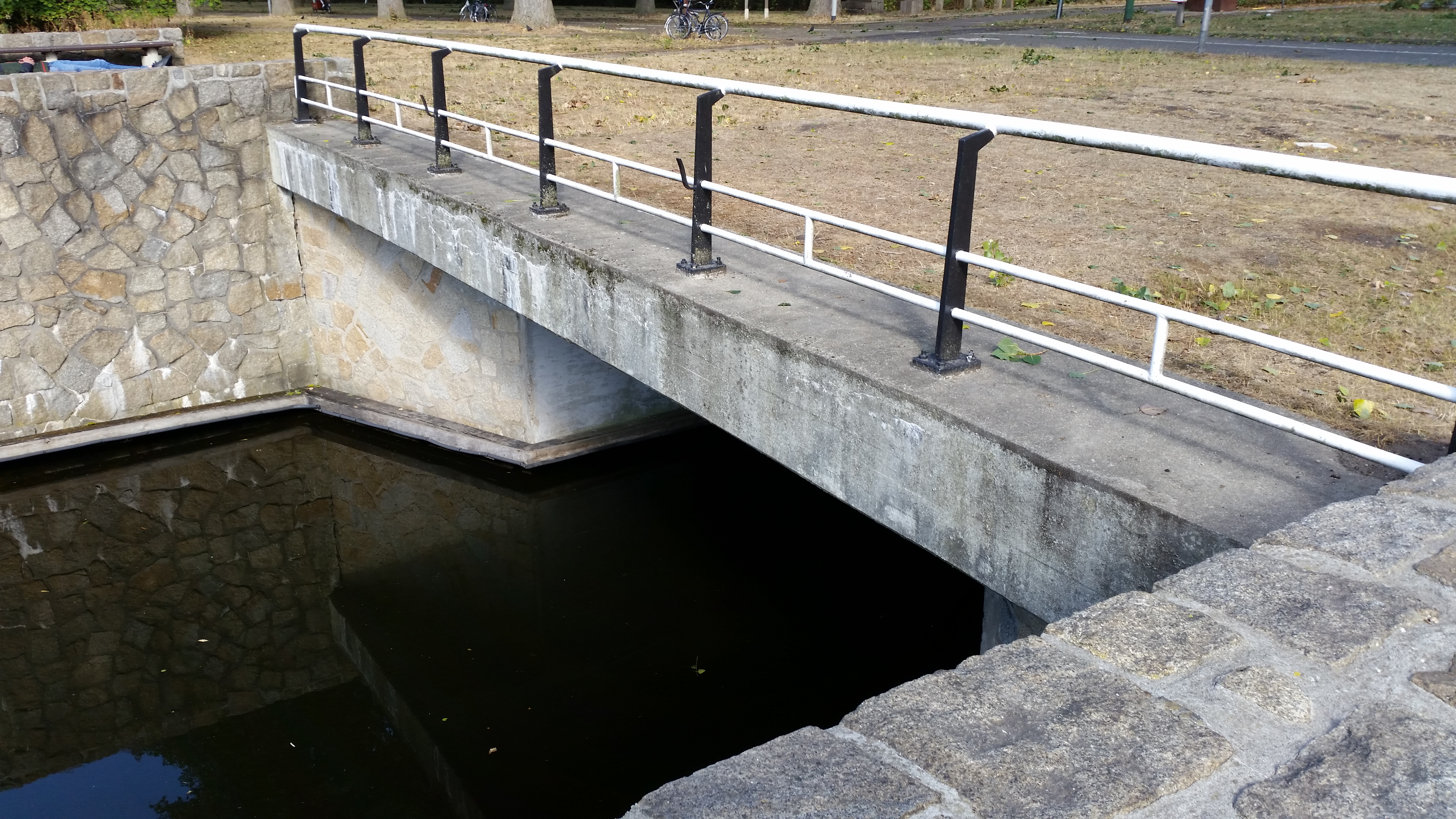 Betonnen overspanning van Brug 501 (in Amsterdam) ingelegd in breuksteen